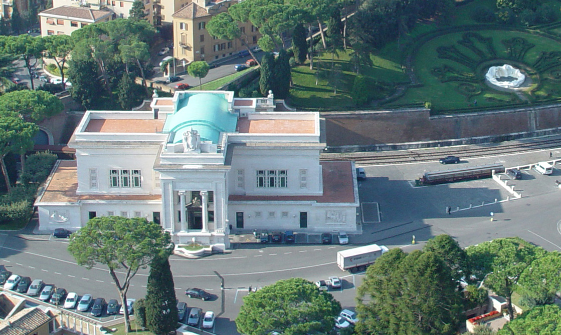 Bahnhof des Vatikans, fotografiert von der Kuppel des Petersdomes im November 2003 durch Walter Hochauer